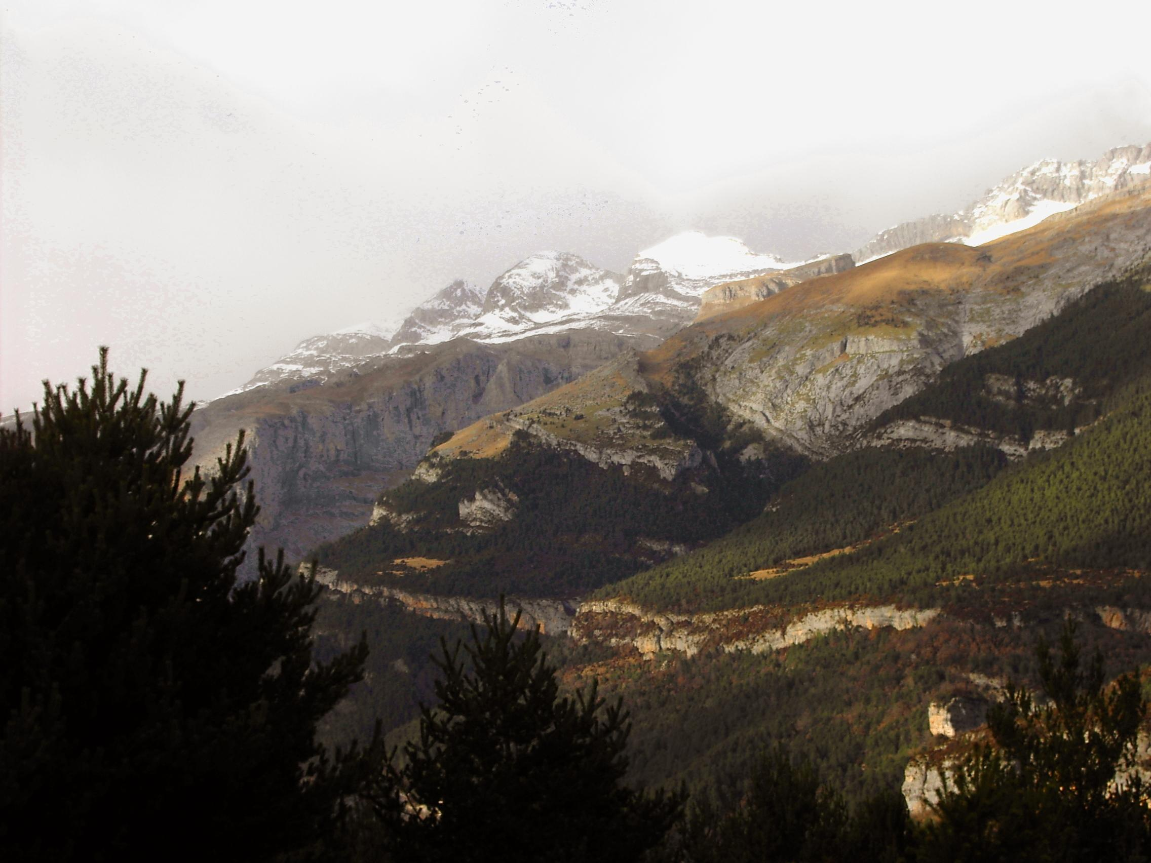 Las Tres Marías, los tres picos más altos de la Sierra de las Zucas, junto al macizo del Monte Perdido.